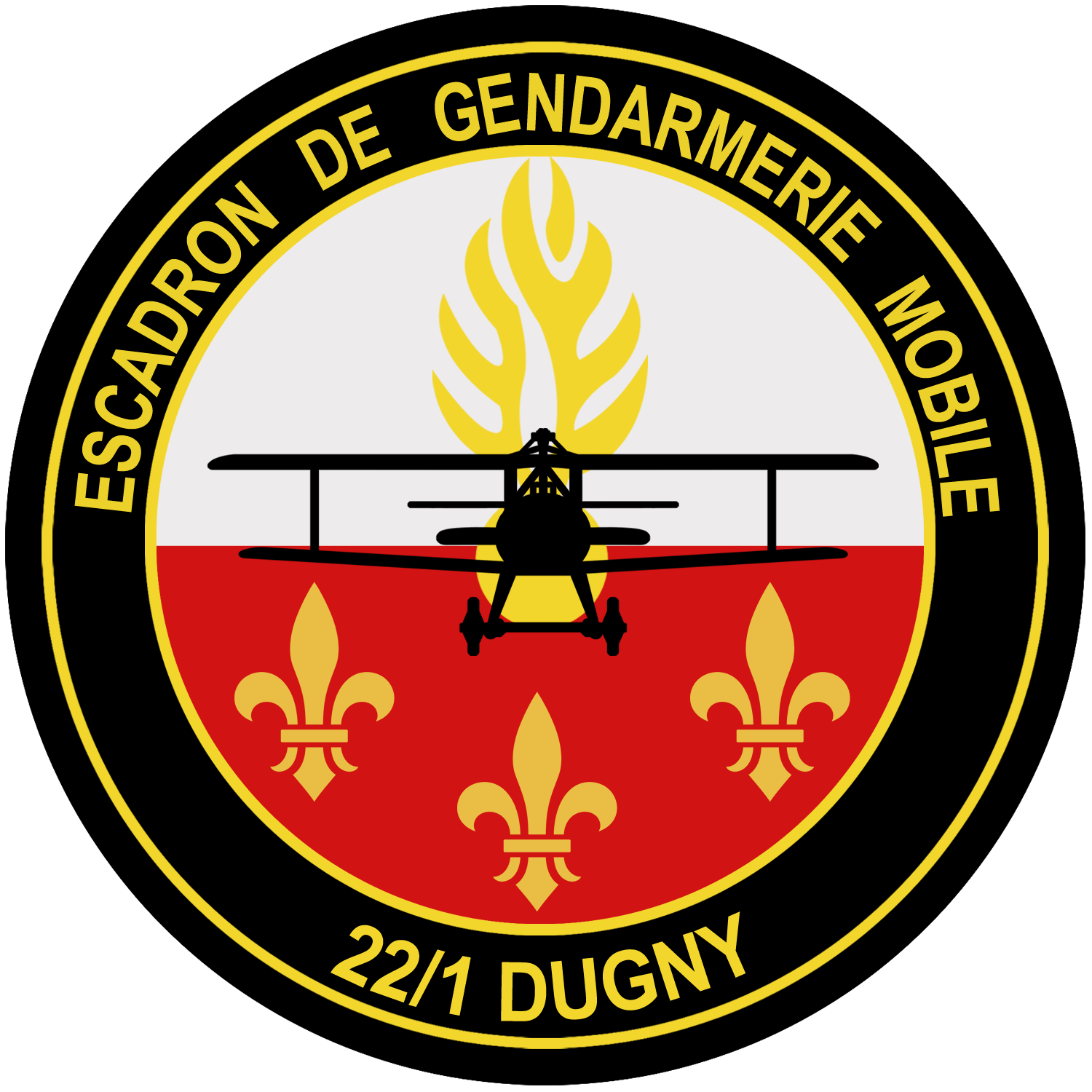 Écusson de l'Escadron de Gendarmerie Mobile 22/1 de Dugny (Seine-Saint-Denis/Île-de-France/Groupement de Gendarmerie Mobile II/1 de Maisons-Alfort). Il est composé au centre d'un avion Nieuport XI, avion utilisé par le pilote de chasse Charles de Tricornot de Rose, qui donna son nom à la caserne de Rose où est hébergé l'escadron. En arrière plan, la grenade jaune à huit flammes jaune, symbole de la Gendarmerie mobile. Sur la partie basse, les 3 fleurs de Lys représentent l'Île de France.